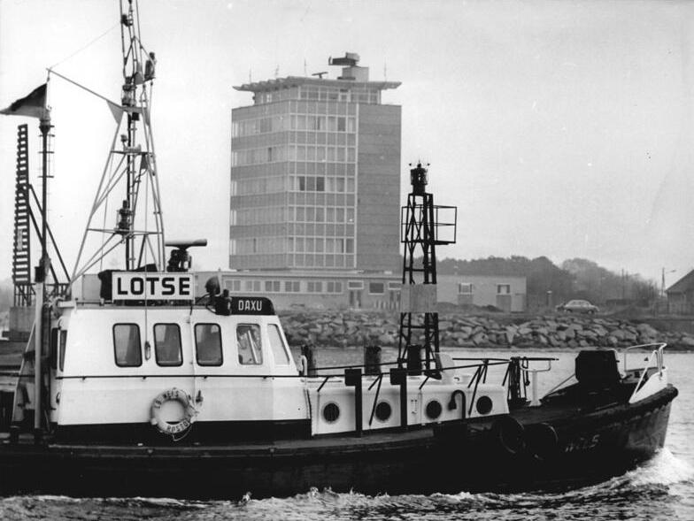 Rostock, Überseehafen, Lotsenstation, Lotsenboot Zentralbild Sindermann 26.11.1970 Rostock: Aus der Arbeit der neuen Rostocker Lotsenstation. Ungefähr 700 Schiffe werden monatlich von der neuen Lotsenstation aus sicher geleitet. In 47 Meter Höhe befindet sich die Antenne der Hafenradaranlage mit einem Durchmesser von 8 Metern. Zu den neuen Wahrzeichen von Wanremünde gehört das Betriebsgebäude der volkseigenen Bagger-, Bugsier- und Bergungsreederei, unmittelbar an der Einfahrt zum Rostocker Überseehafen. Mit diesem Bau wurden besonders für die Betriebsteile Lotsen und Bugsieren bzw. technische Dienstleistungen der Reederei verbesserte Arbeitsmöglichkeiten für einen sicheren ein- und auslaufenden Schiffsverkehr geschaffen. Eingerichtet mit modernsten Geräten wie Wechselsprech- und UKW-Anlagen sowie einem speziellen Hafen-Radar, werden von hier aus die Schiffe auch bei Schlechtwetter sicher von der Reede durch die Hafeneinfahrt an die Liegeplätze im Überseehafen geleitet.